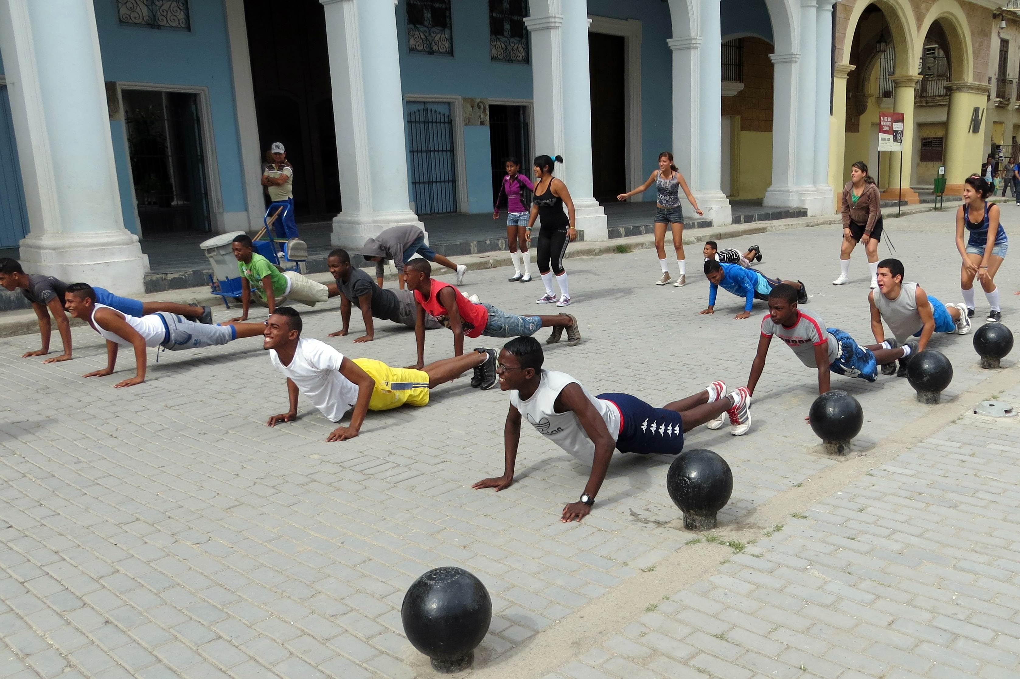 Secondary school students. Plaza Vejada, Havana, Cuba.